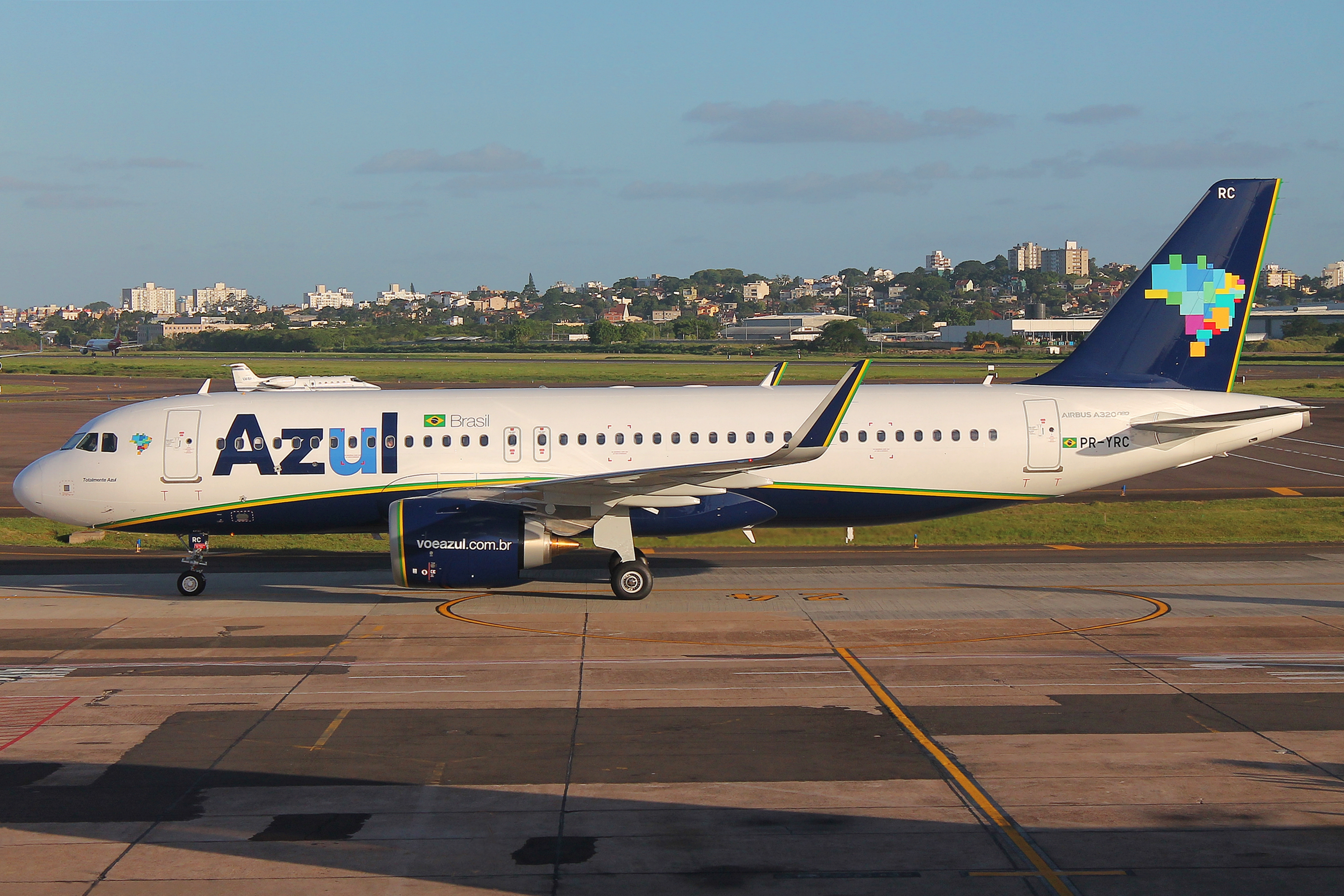 A320neo Azul SBPA